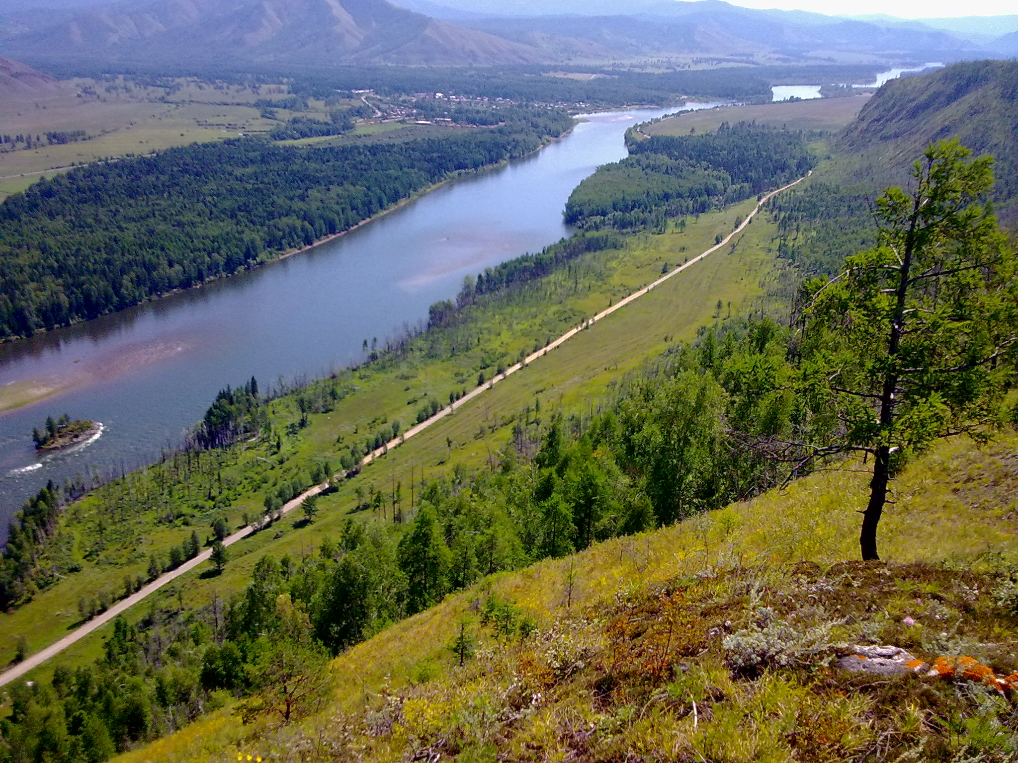 Река Малый Енисей (Ка-Хем): вид на Дерзиг-Аксы